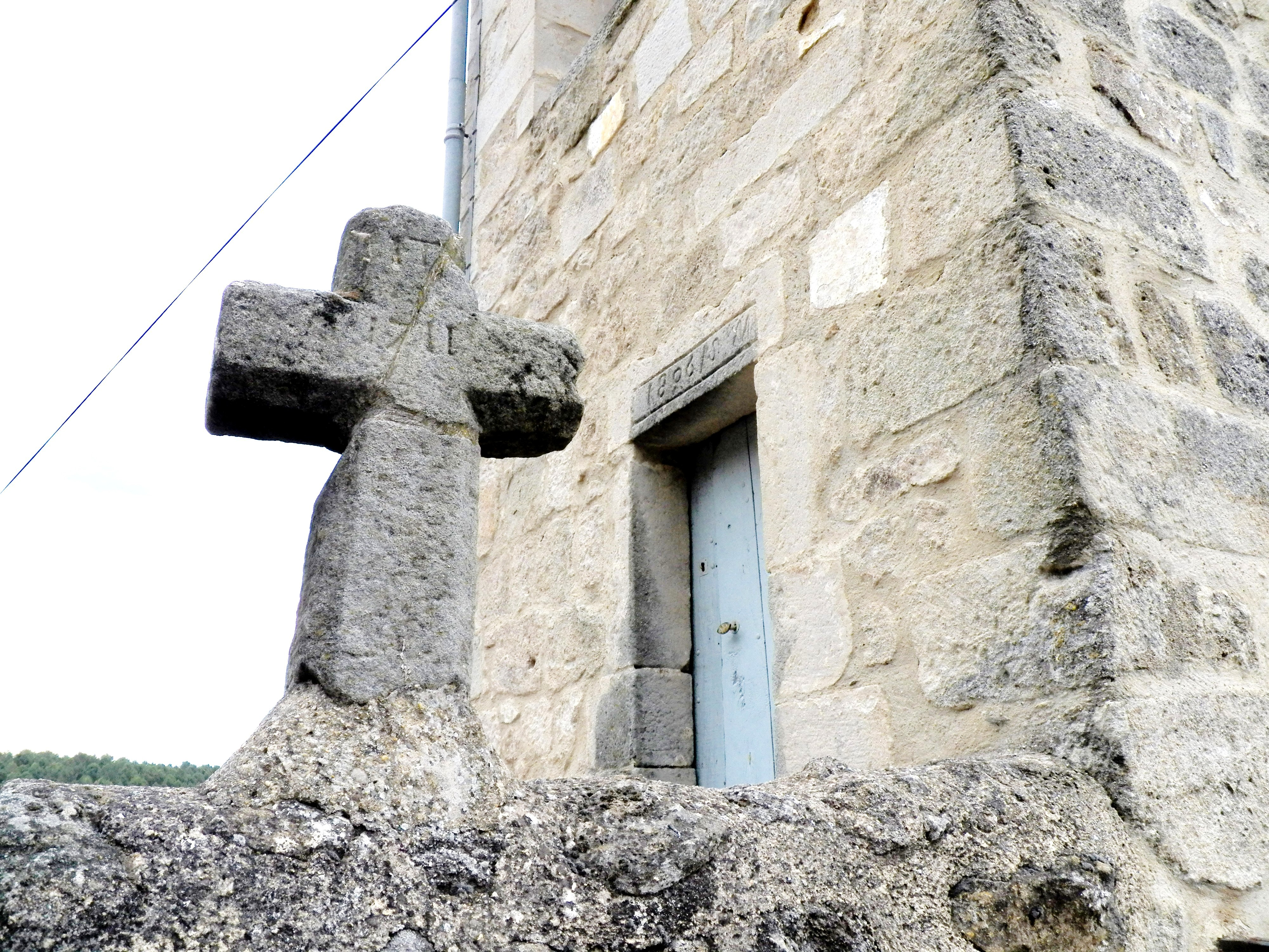 Croix et entrée du clocher.